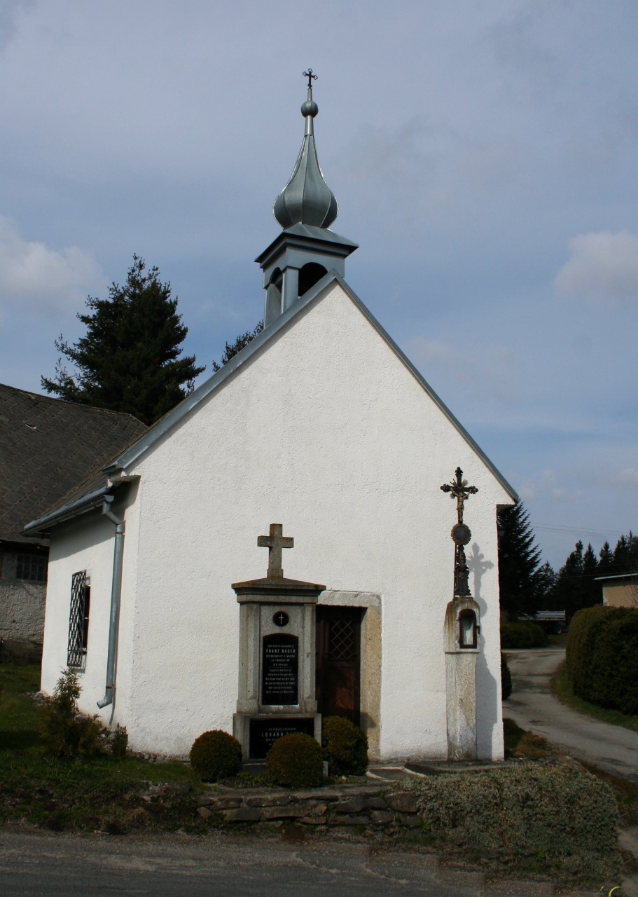 Kaplička na Svojších